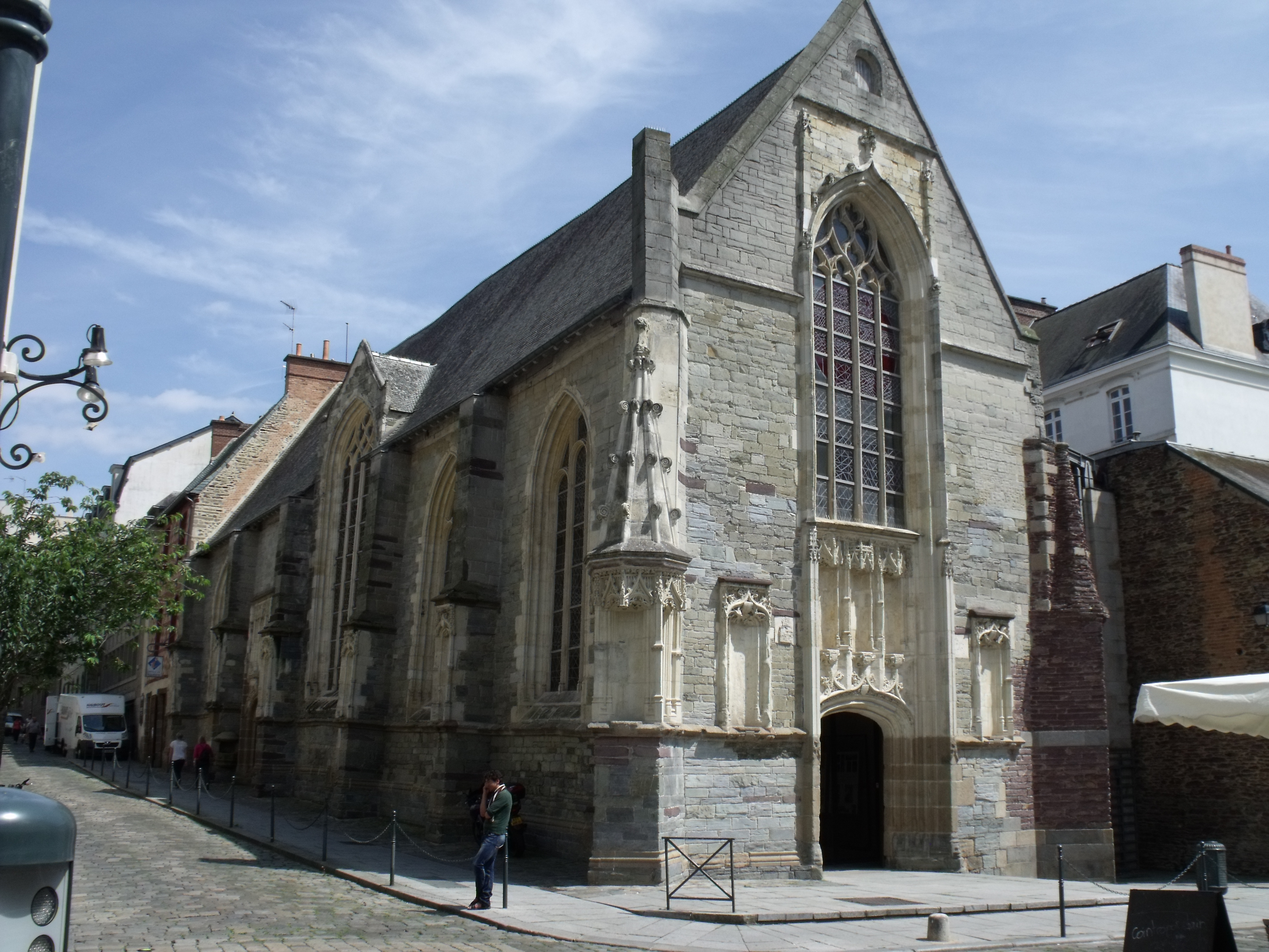 Antigua capilla de Saint-Yves. En 2012 era oficina de turismo. .